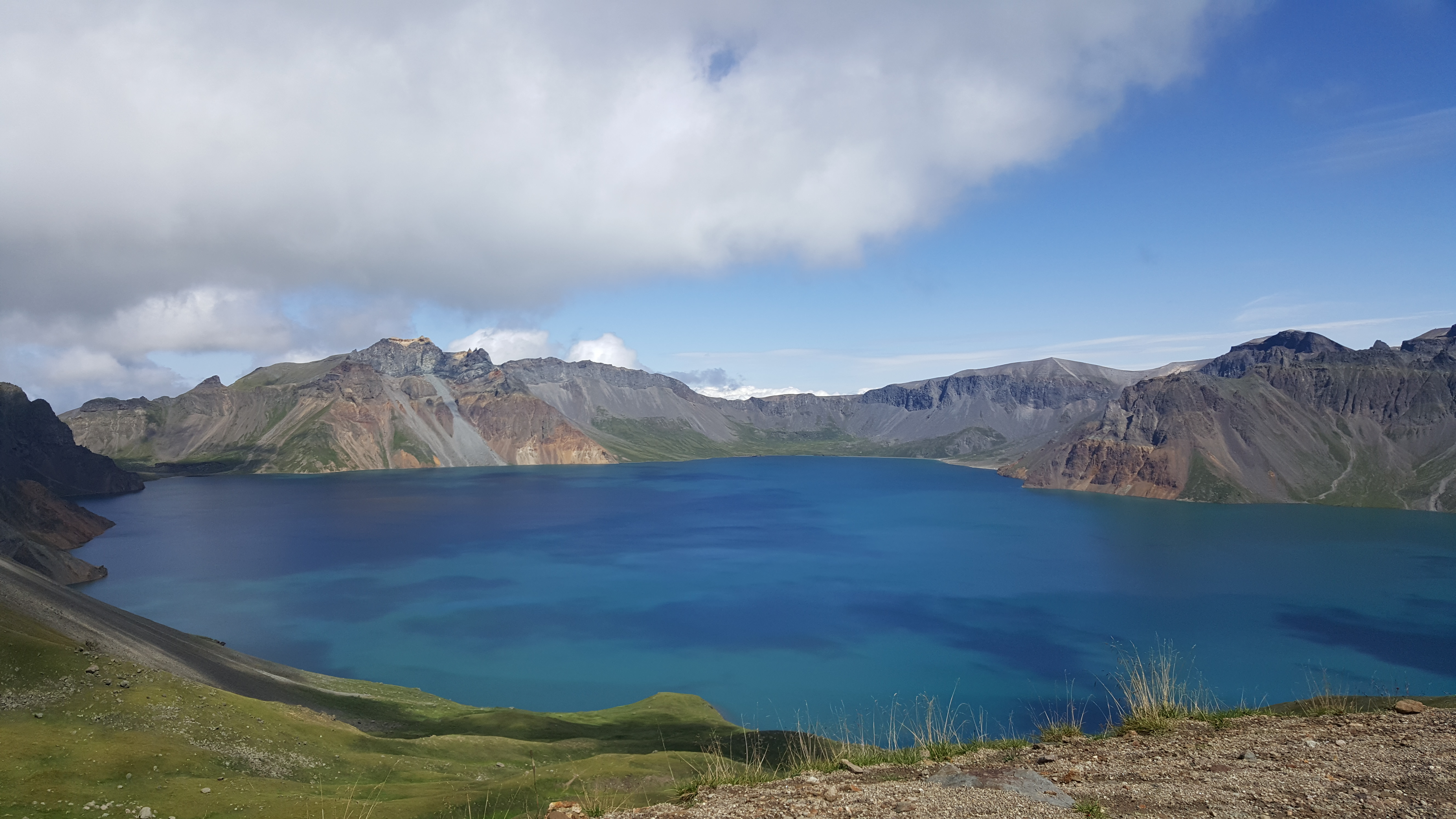 从长白山西坡看天池